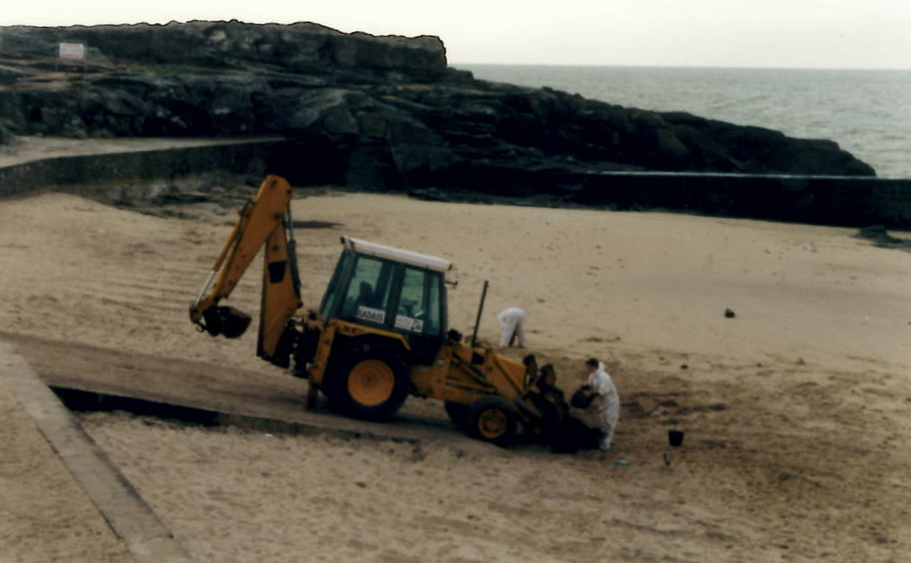 Batz-sur-Mer - Marée noire Erika - Janvier 2000